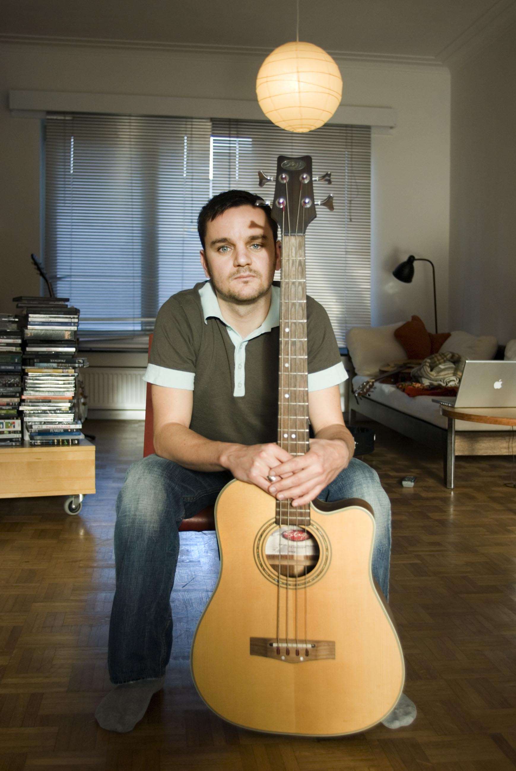 Sam Valkenborgh, zanger Fixkes.